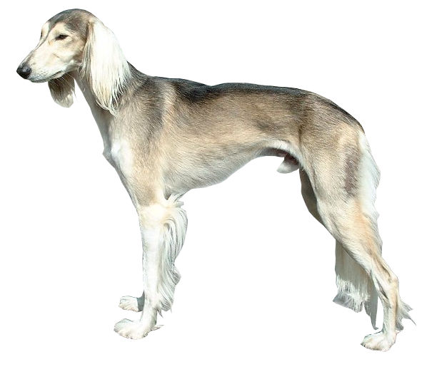 Saluki sur fond blanc